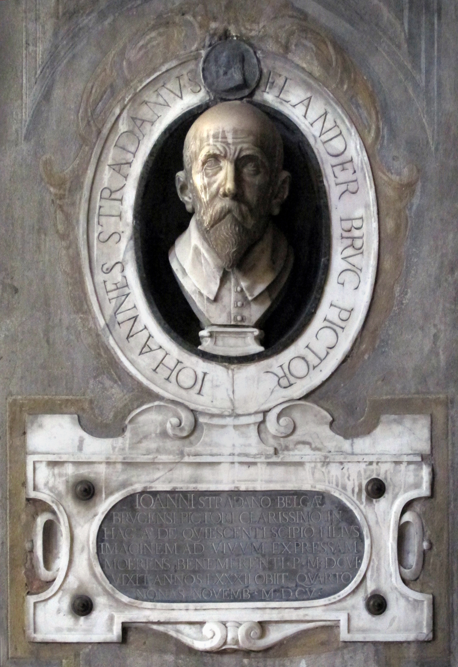 Annunziata, tomba di giovanni stradano